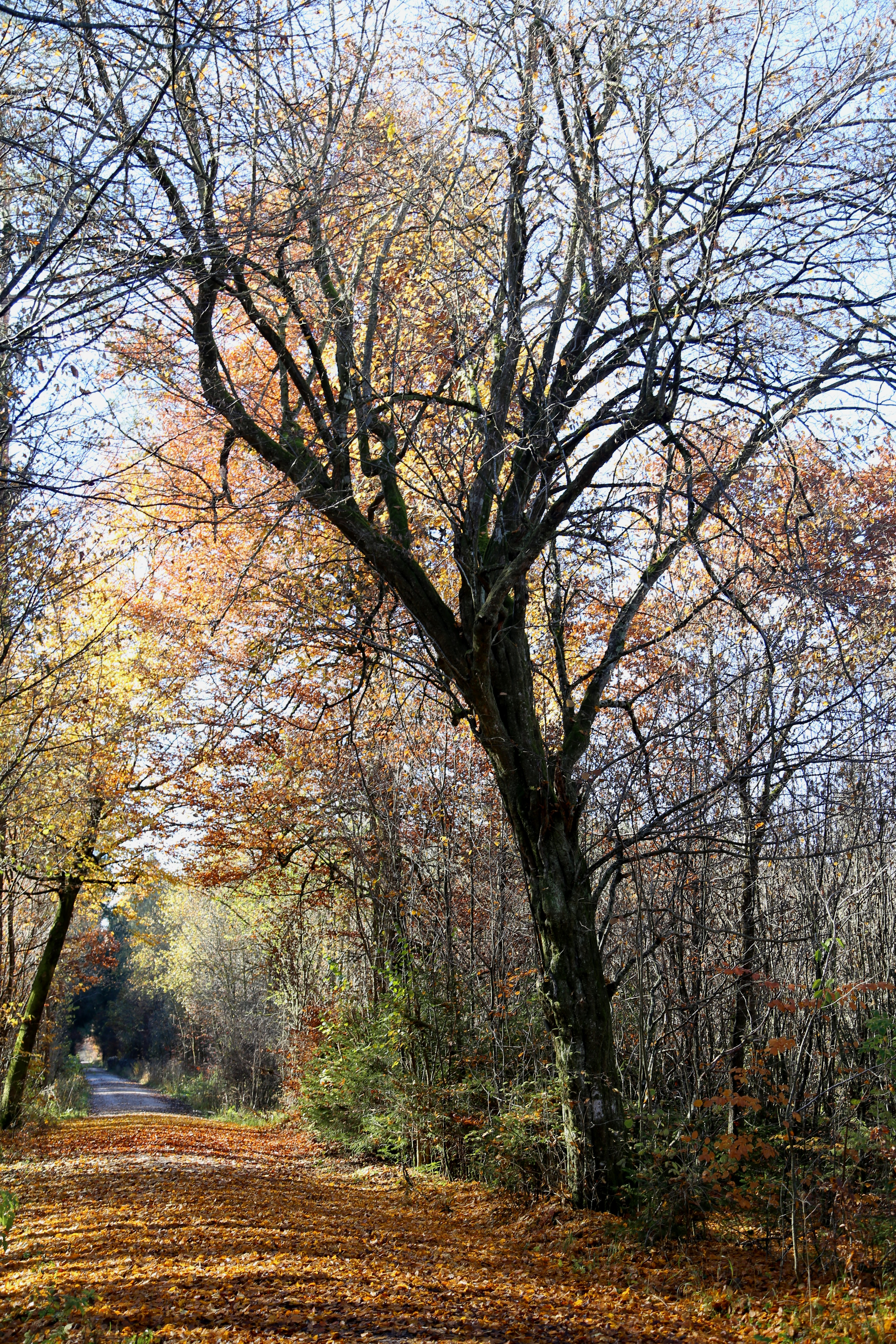 Deisenhofener Forst bei Lanzenhaar, Sauerlach